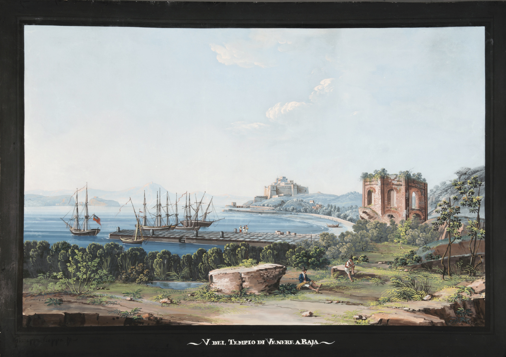 Vista del Tempio di Venere a Baia